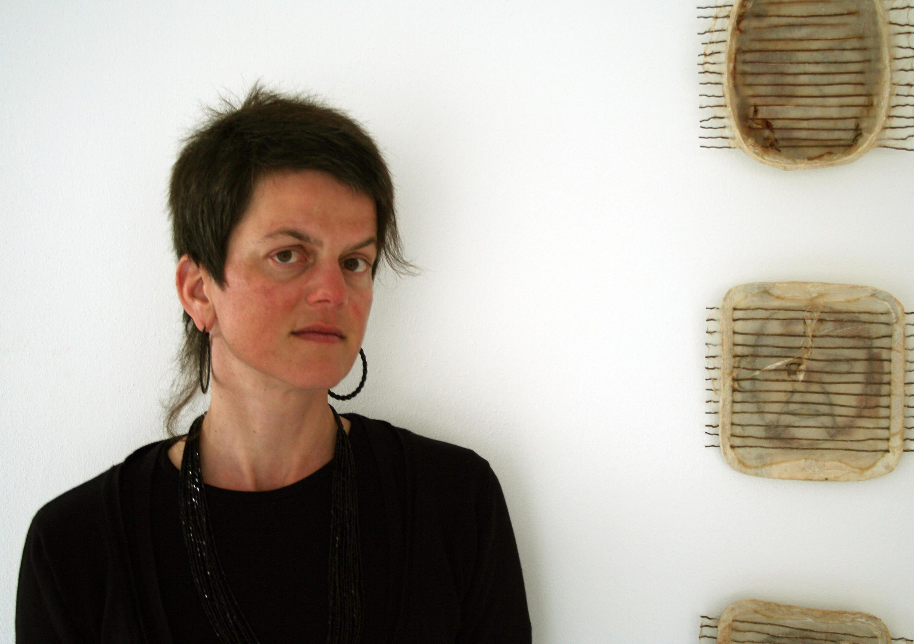 Fotoaufnahme der Künstlerin Uta Belina Waeger in ihrem Atelier